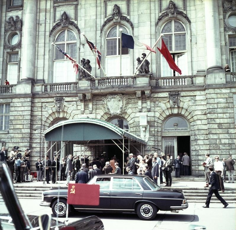 ADN-ZB/Sturm 3.6.72 Westberlin: Ankunft der Außenminister der vier Mächte Blick auf das früher vom Alliierten Kontrollrat benutzte Gebäude im amerikanischen Sektor von Westberlin, wo am 3.6.1972 die Außenminister der vier Mächte das Schlußprotokoll zum vierseitigen Abkommen über Westberlin unterzeichneten.